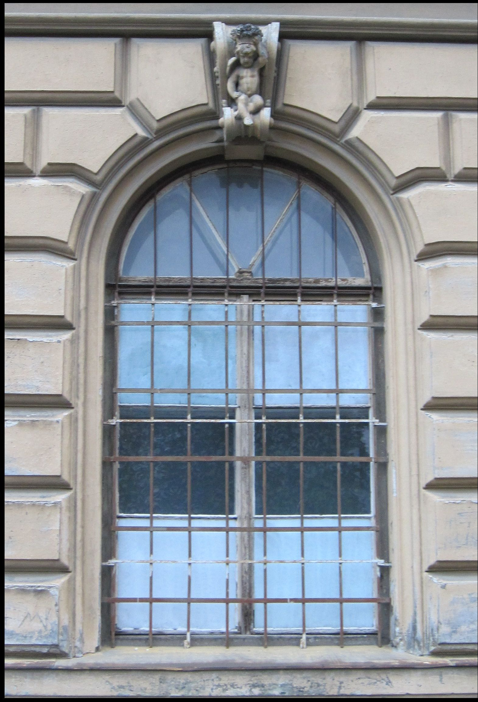 Detail okna zasazeného v bosovaném přízemí hlavní fasády. Klenák s postavou dítěte je typický pro stavby Josefa Arnolda.